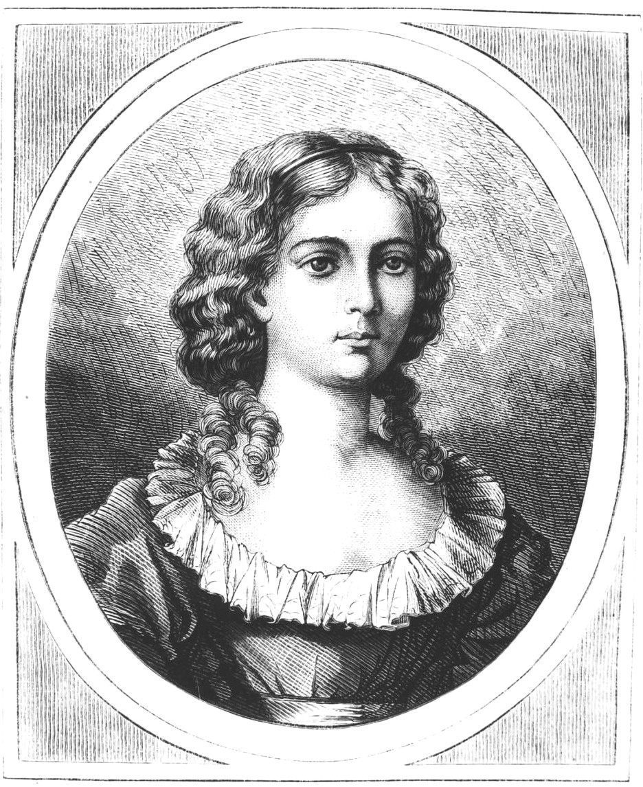 anonimowy drzeworyt wg rysunku Tytusa Maleszewskiego wykonanego na podstawie zaginionego portretu olejnego, opublikowany w „Tygodniku Ilustrowanym” 1868 (nr 25)